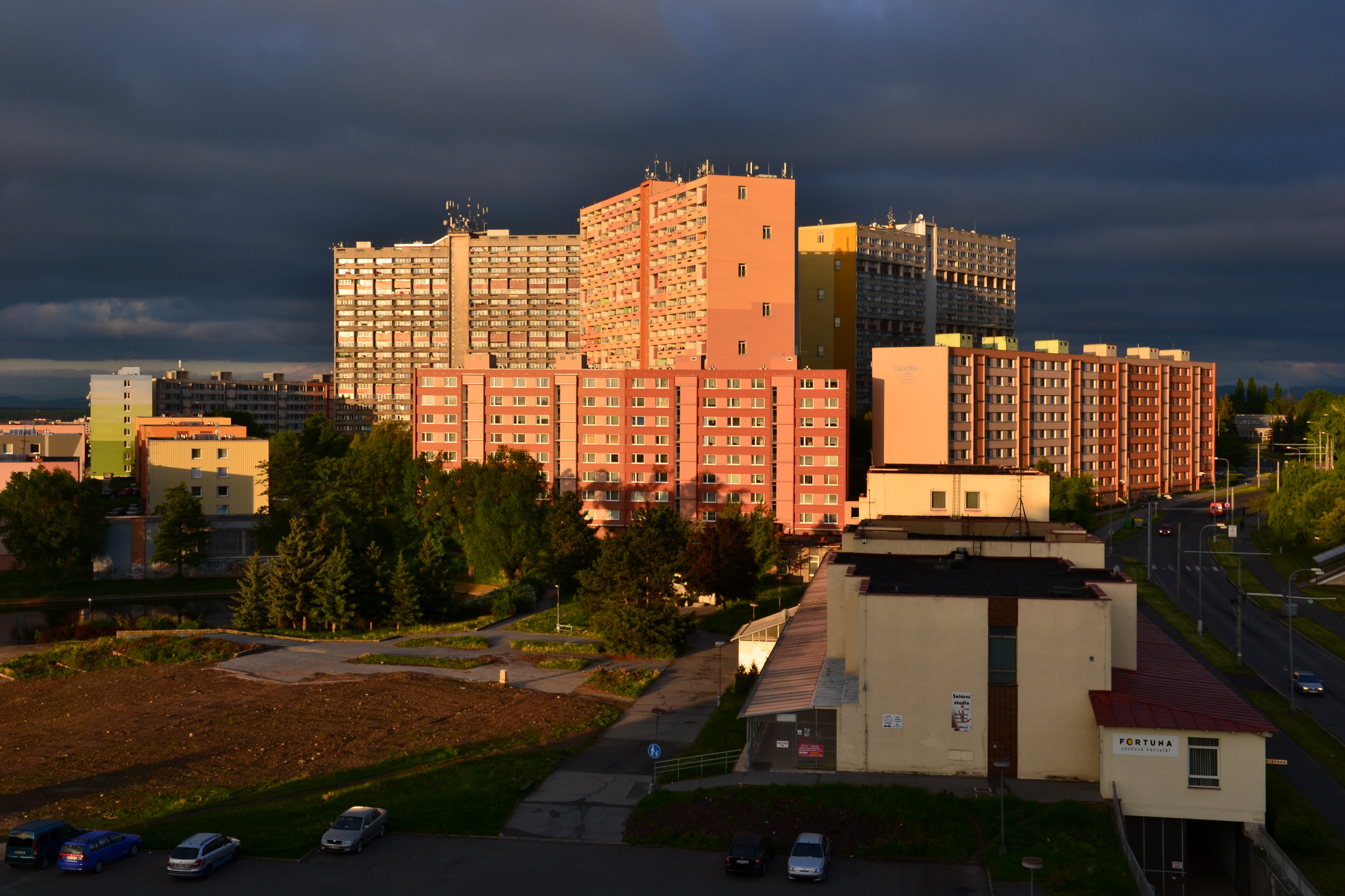 Chomutov - experimentální domy s mezonetovými byty na sídlišti Březenecká. Pohled od Dřínovské ulice podél Březenecké ulice ke Kundratické ulici.